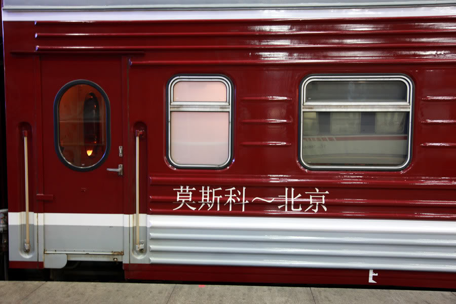 莫斯科至北京的19/20次列车